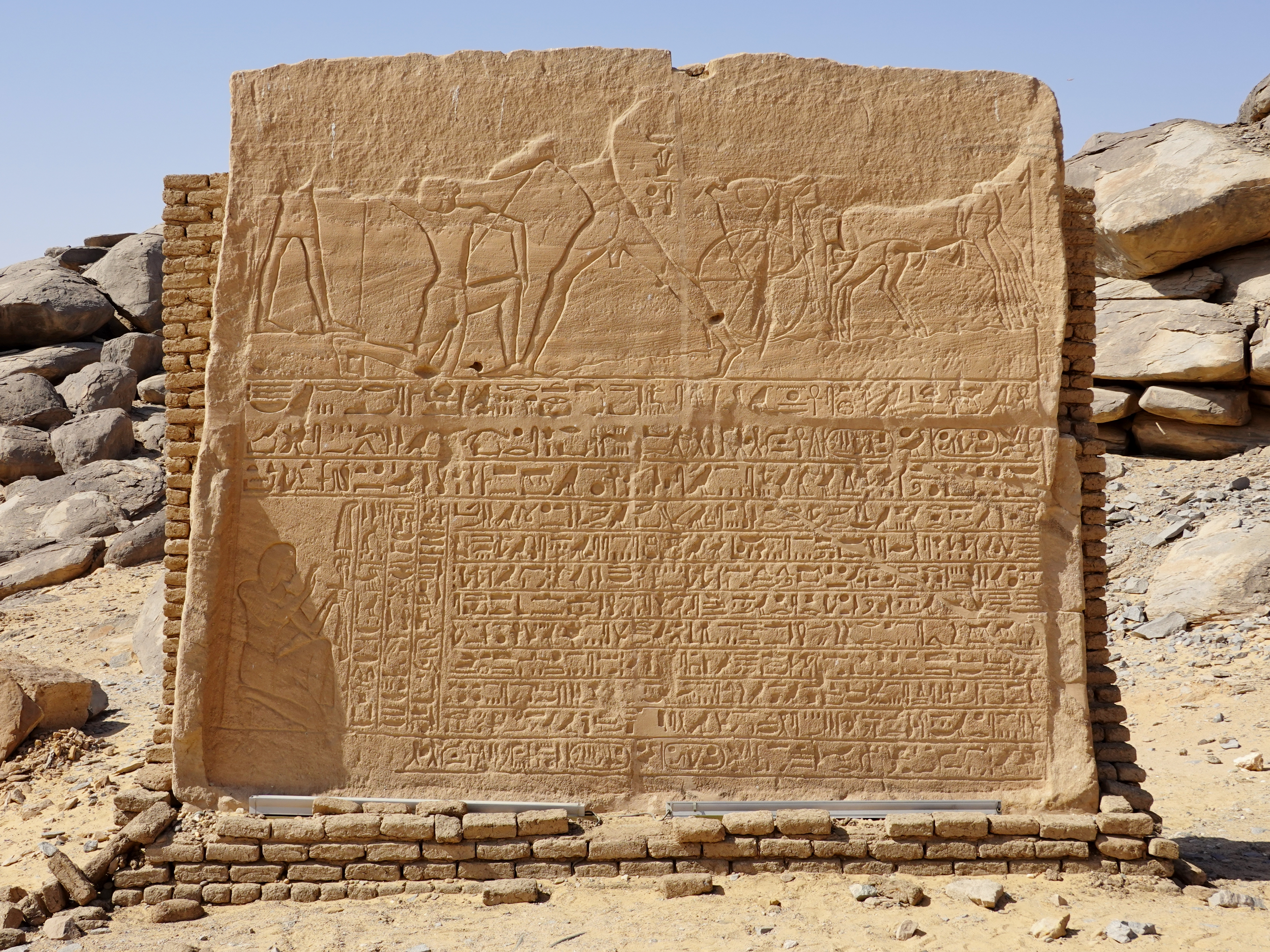 Standort der Amenemope-Stele auf der Insel Neu-Kalabscha im Nassersee, Ägypten